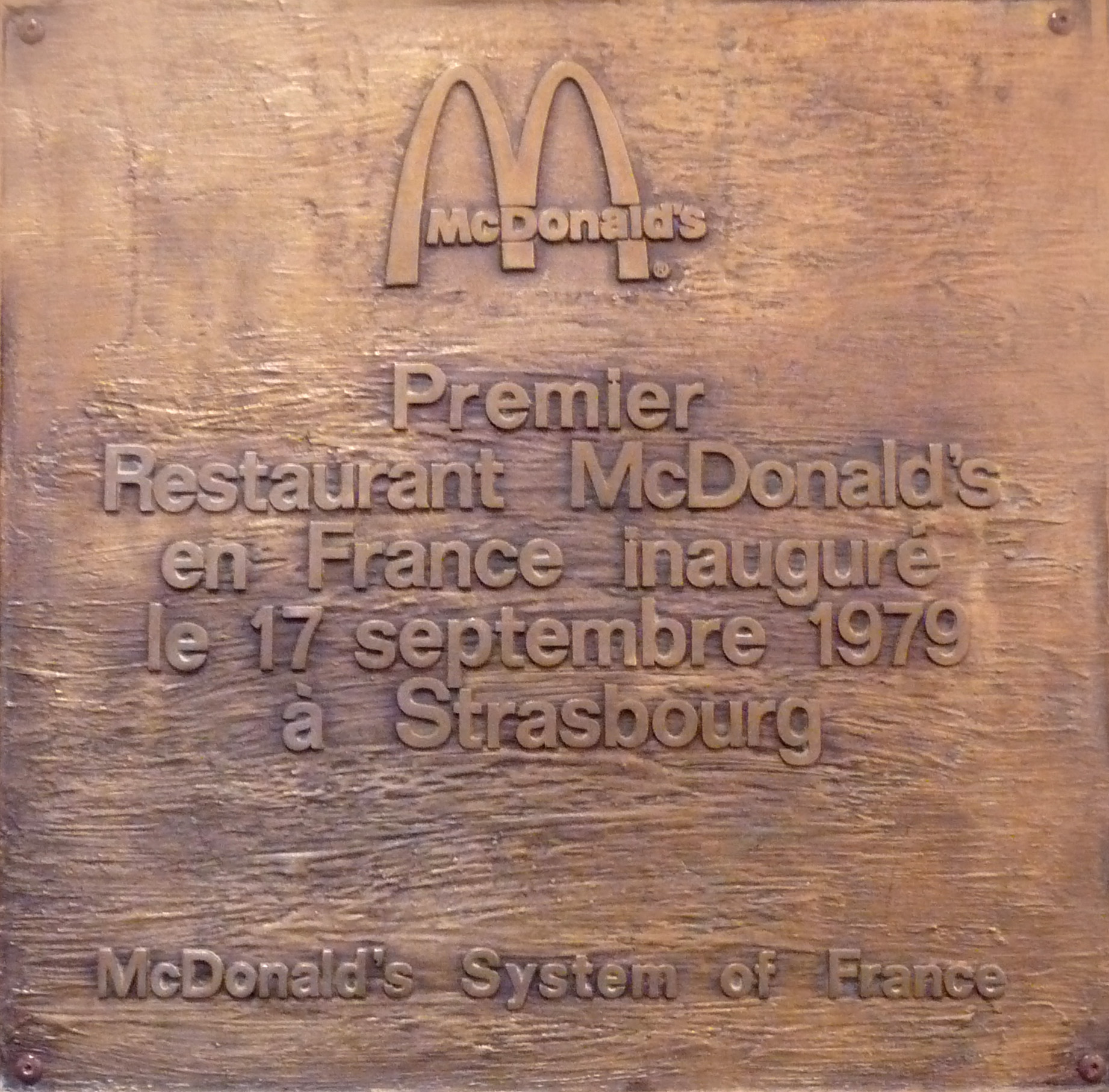 Plaque commémorant l'ouverture du premier restaurant McDonald's français à Strasbourg le 17 septembre 1979 (Centre commercial des Halles)